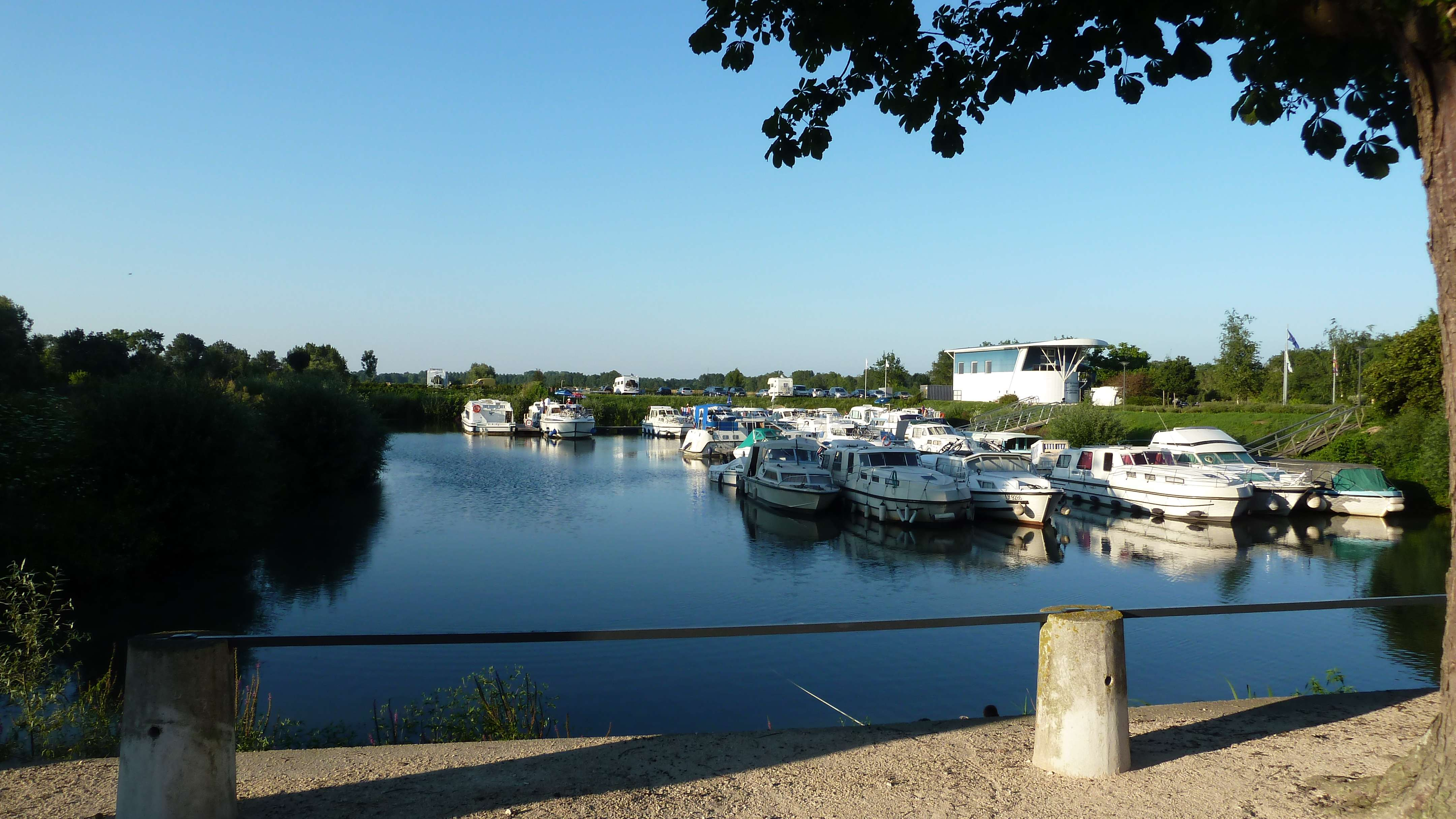 Port de plaisance de Pontailler sur Saône Les Canalous.